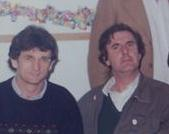 Jean-François Beltramini et Bernard Ménez